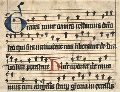 Grates nunc omnes, in: Sequentiarium et Hymnarium, Handschrift des 15. Jahrhunderts, Stadtbibliothek Lübeck, Signatur Ms. theol. lat. 2° 22, f. 1 r